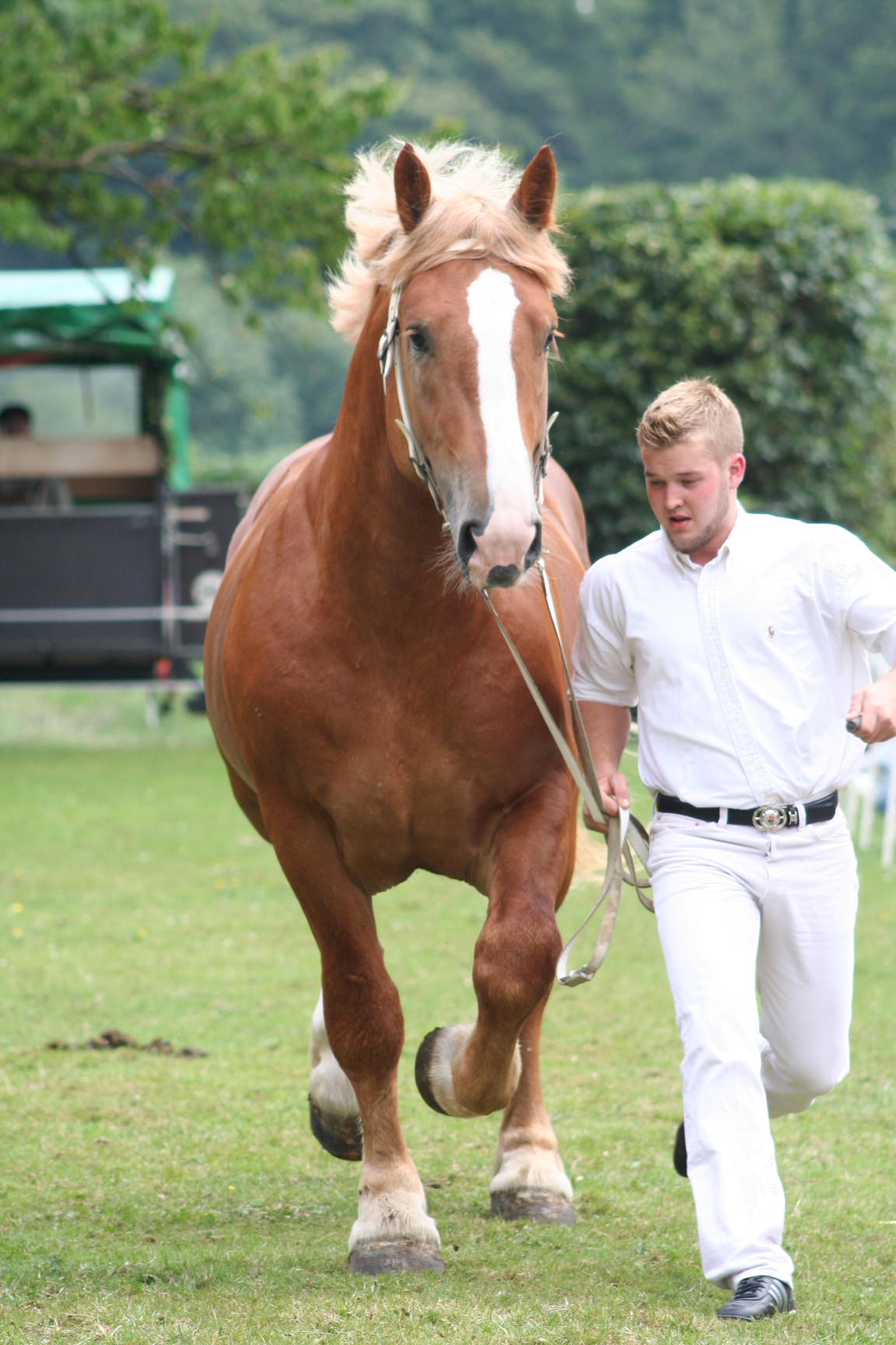 Zuchtschau auf Gut Kamp. Im Bild Peter Isenberg mit einem Schleswiger Kaltblut des Zuchtverbandes V.S.P..